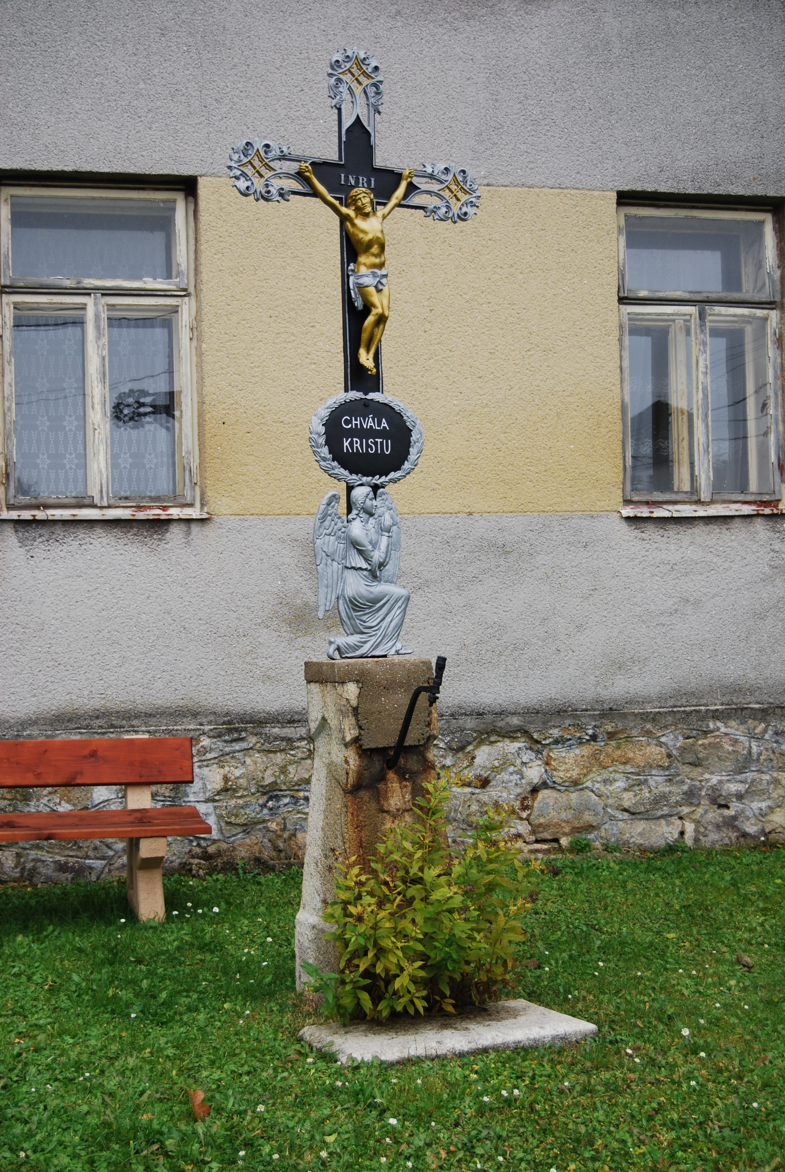 Kříž v obci Drahnětice. Drahnětice je malá vesnice, část obce Jistebnice v okrese Tábor. Česká republika.